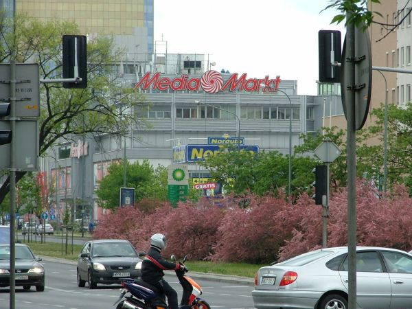 POL, Warsaw, Poland, Praga Południe, Grochów, Ostrobramska Street